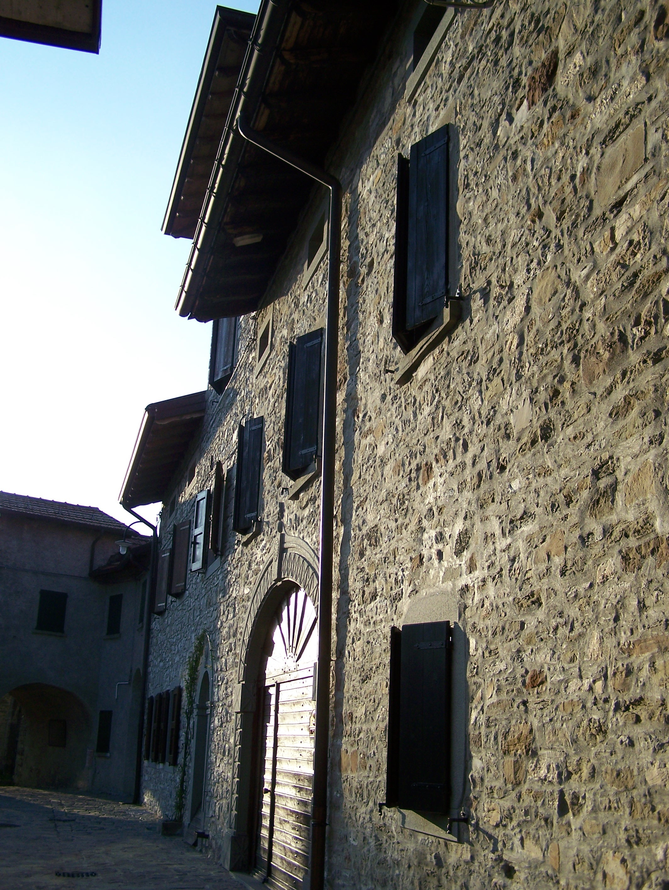 Autore: Utente:Kronos Fonte: fotocamera digitale non professionale Descrizione: scorcio del paese Montedello, case in pietra nella sua via principale; visione orientata da est verso ovest